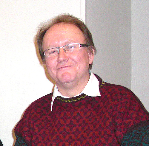 Ordfører i Grong Erik Seem.